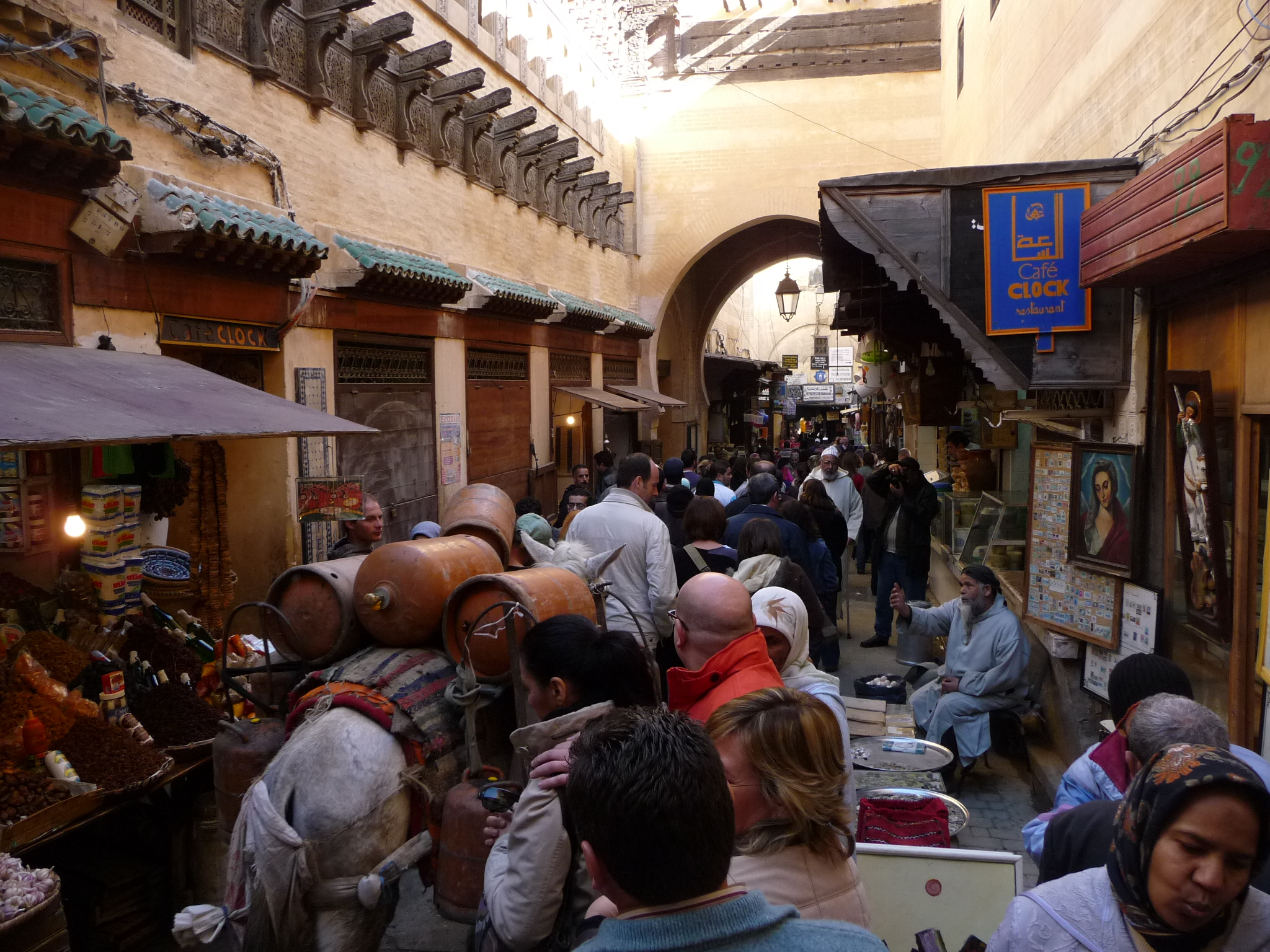 Fez-P1050486.JPG